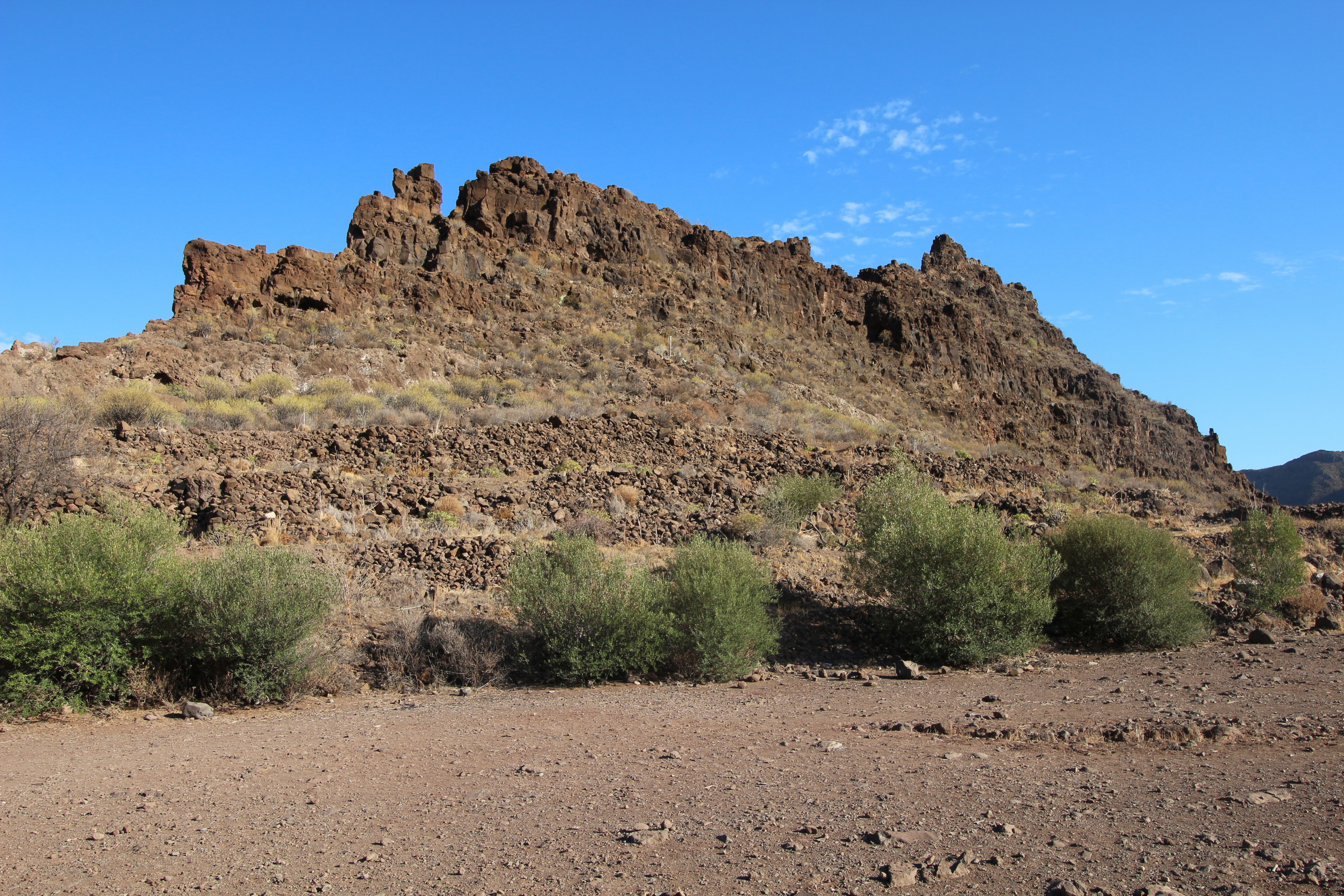 Santa Lucía de Tirajana, Gran Canaria.